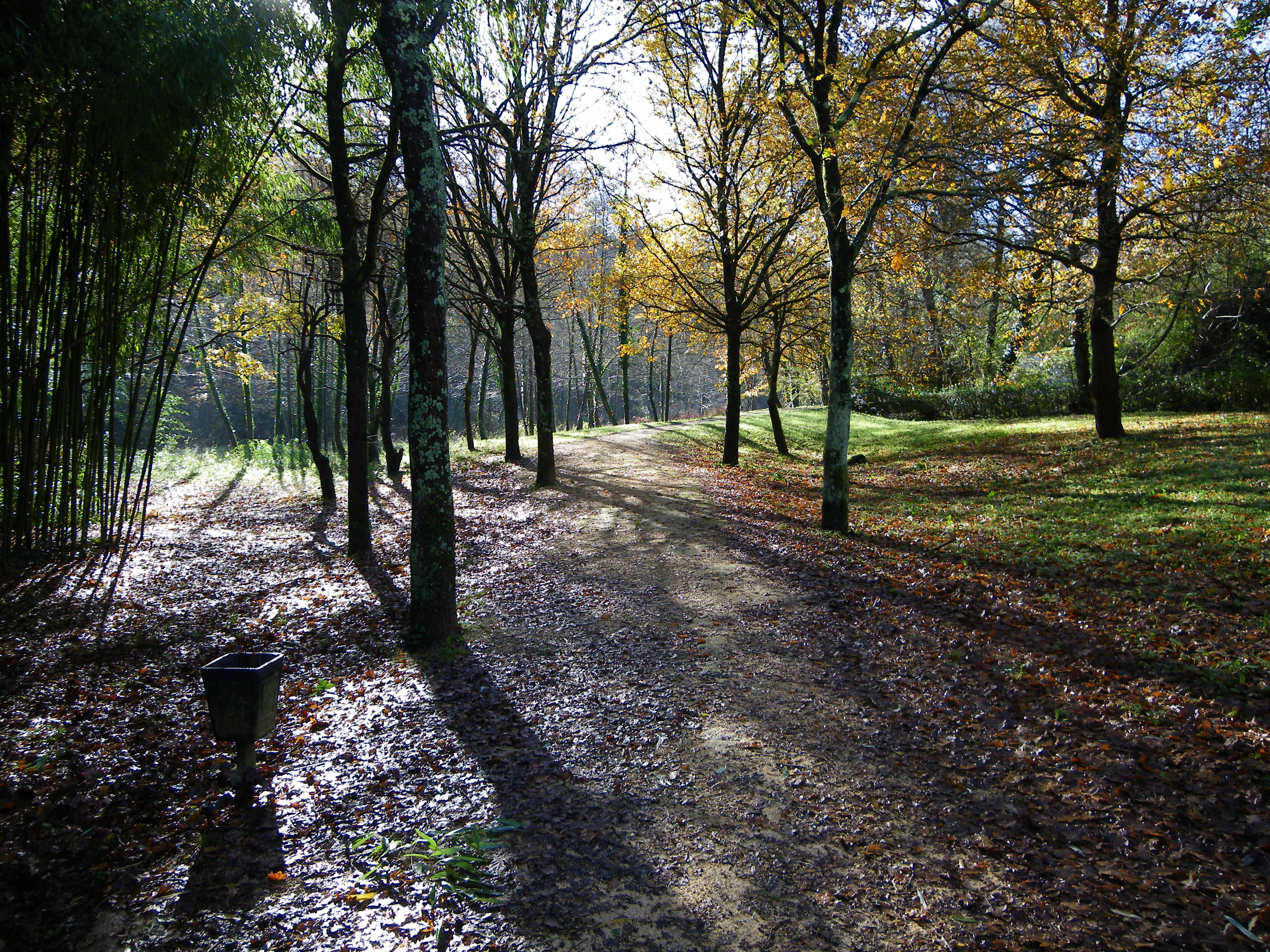 El Pobal (Olaundia edo Olazaharra) deritzon ingurua, Muskiz, Enkarterri, Bizkaia.